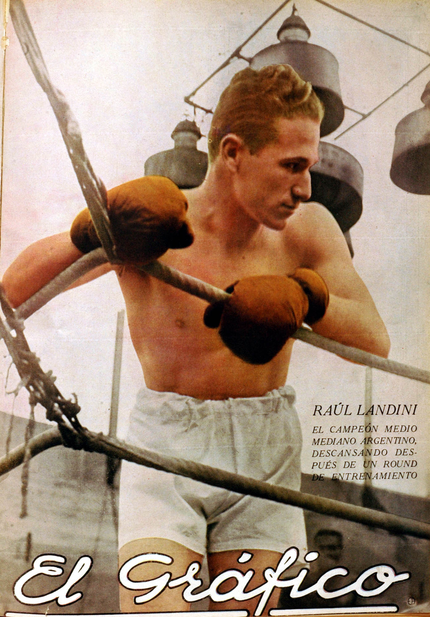 El Grafico del 12 de Noviembre de 1932. Edicion 696